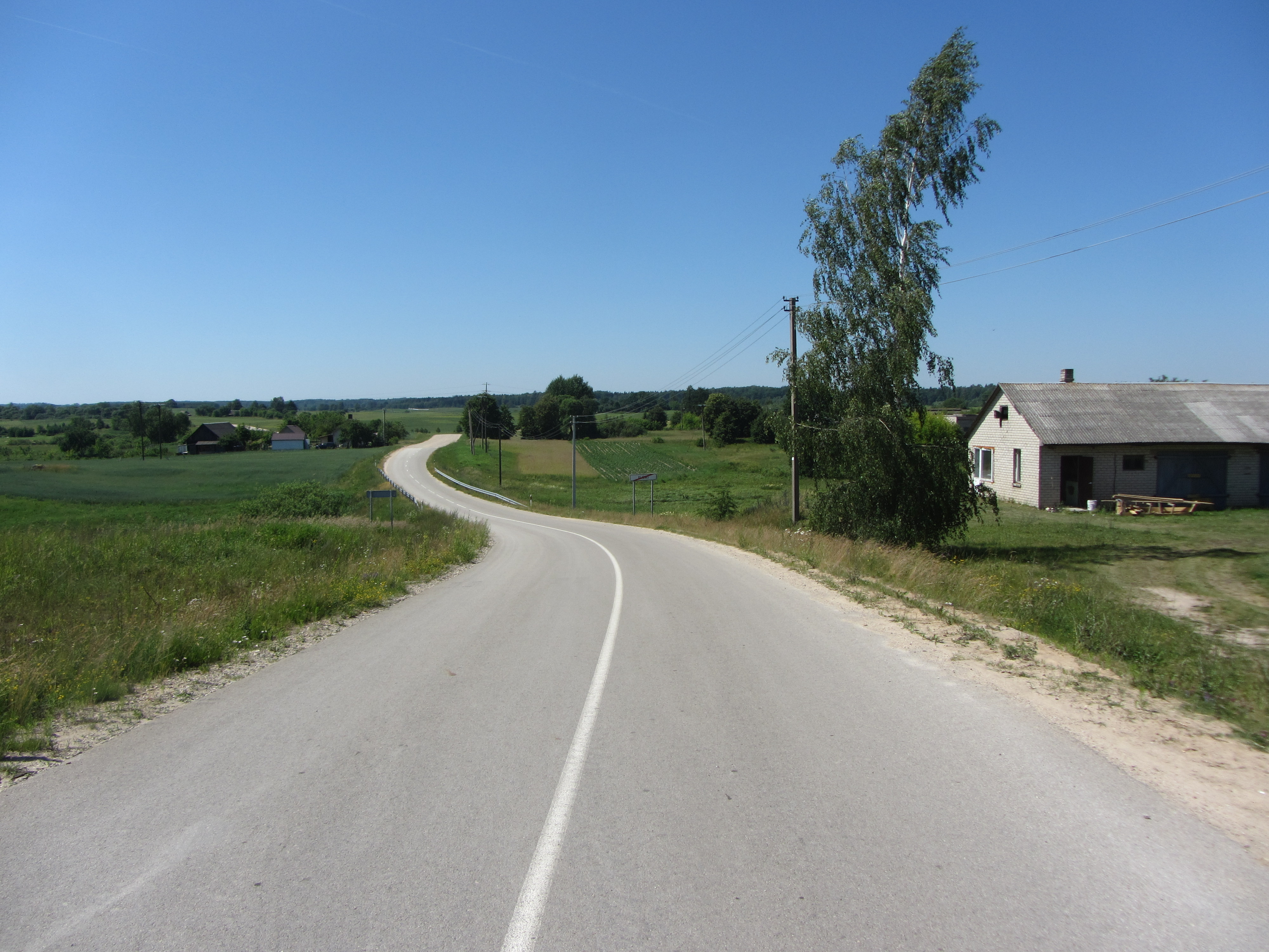 Ilgai 64120, Lithuania